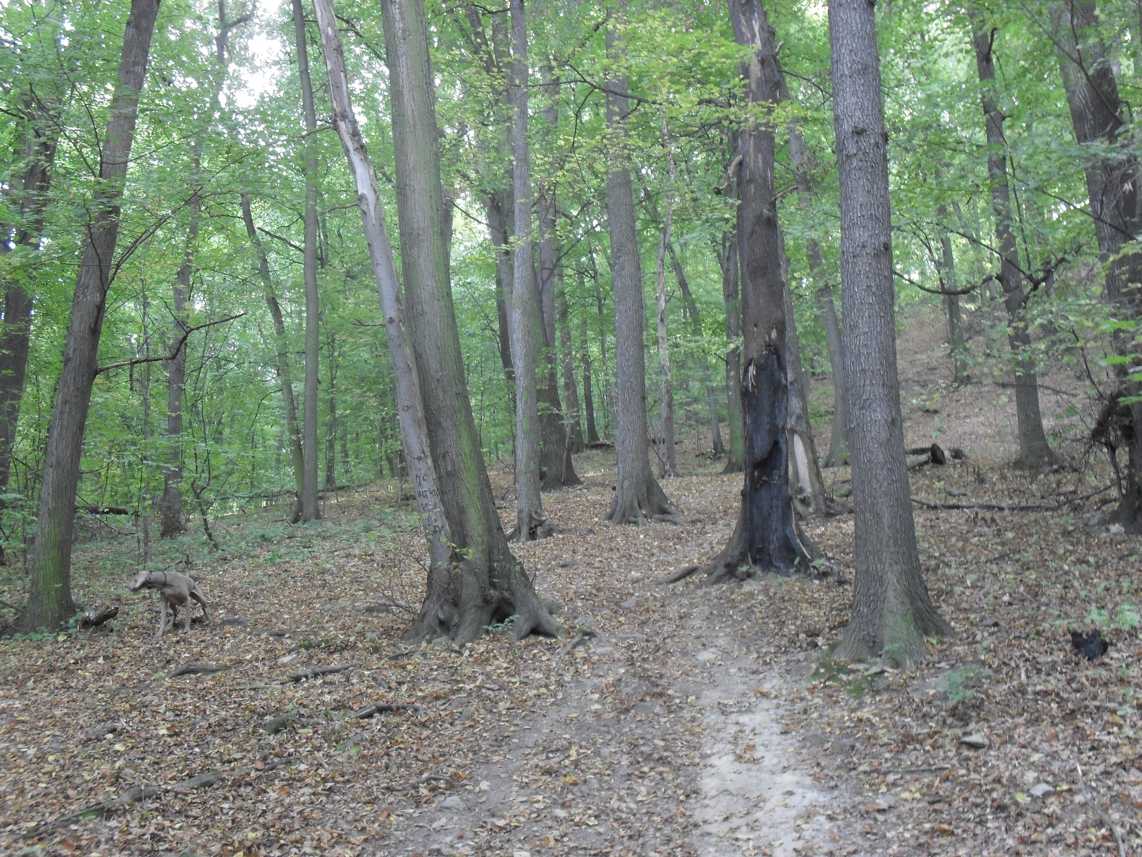 Hrad Doubravská hora, hradní zřícenina, a dominanta města Teplice.